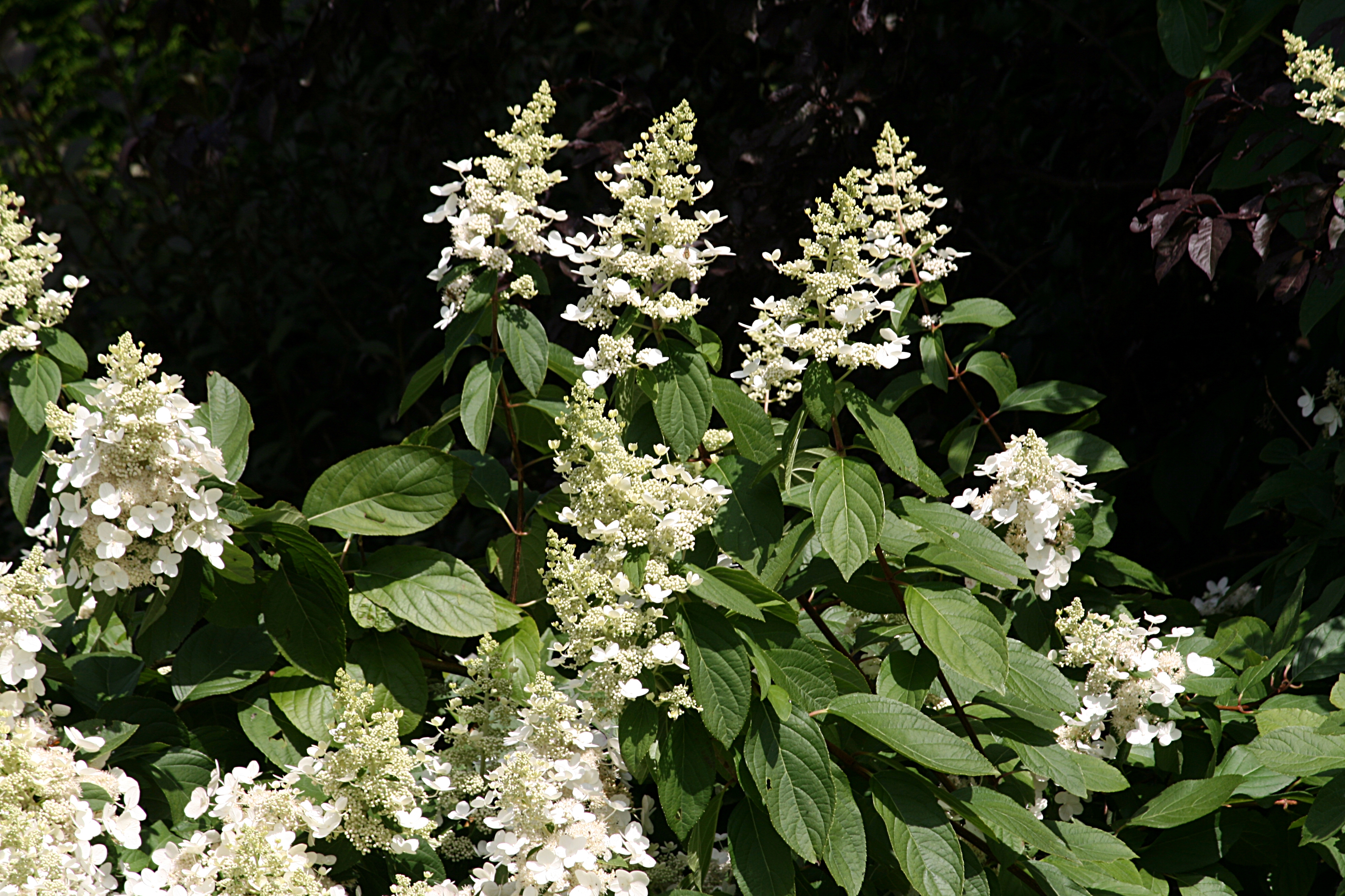 Hortensie - Hydrangea paniculata, Gardening Germany